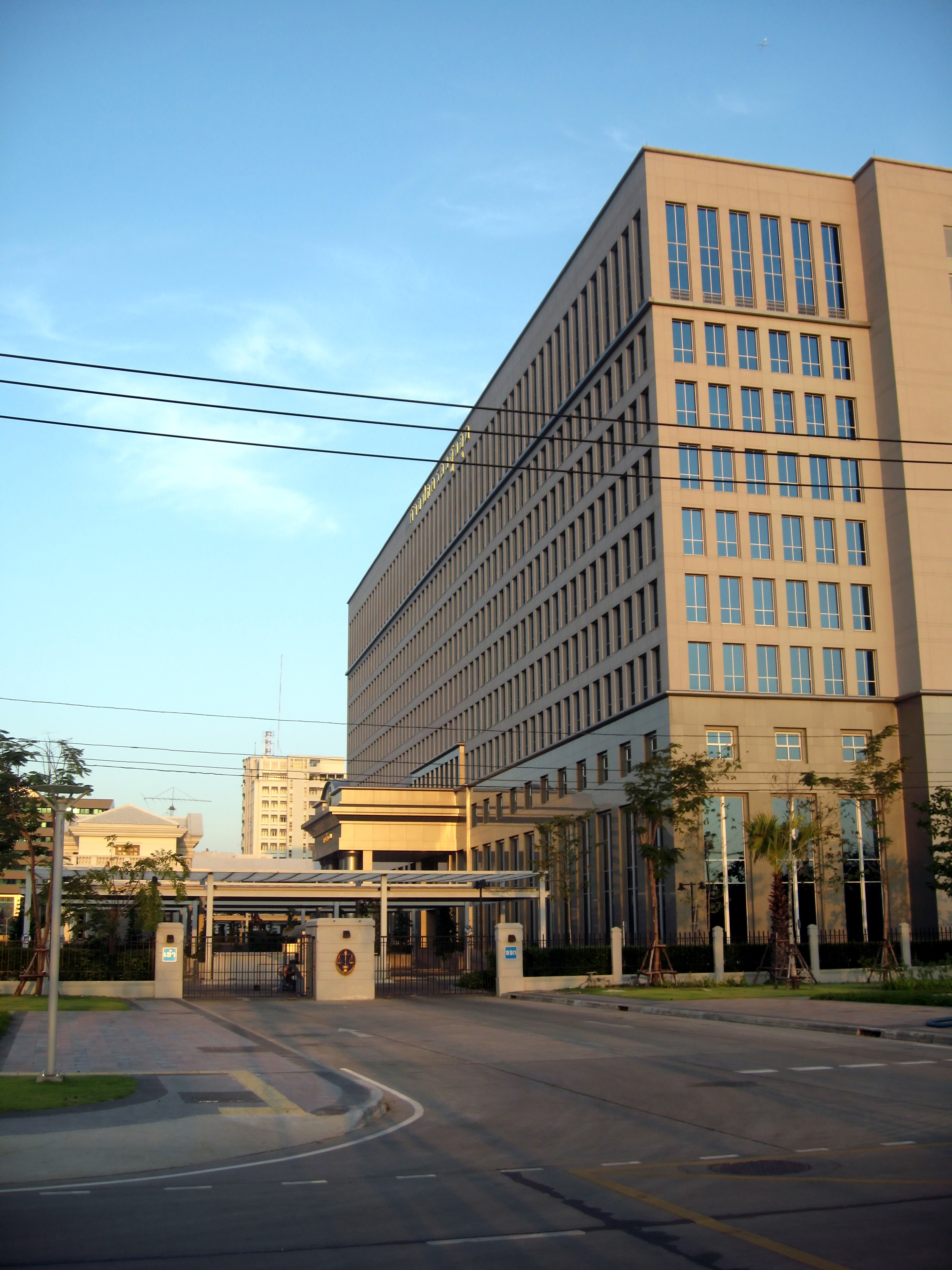 ศาลปกครอง(หรือเปล่า)